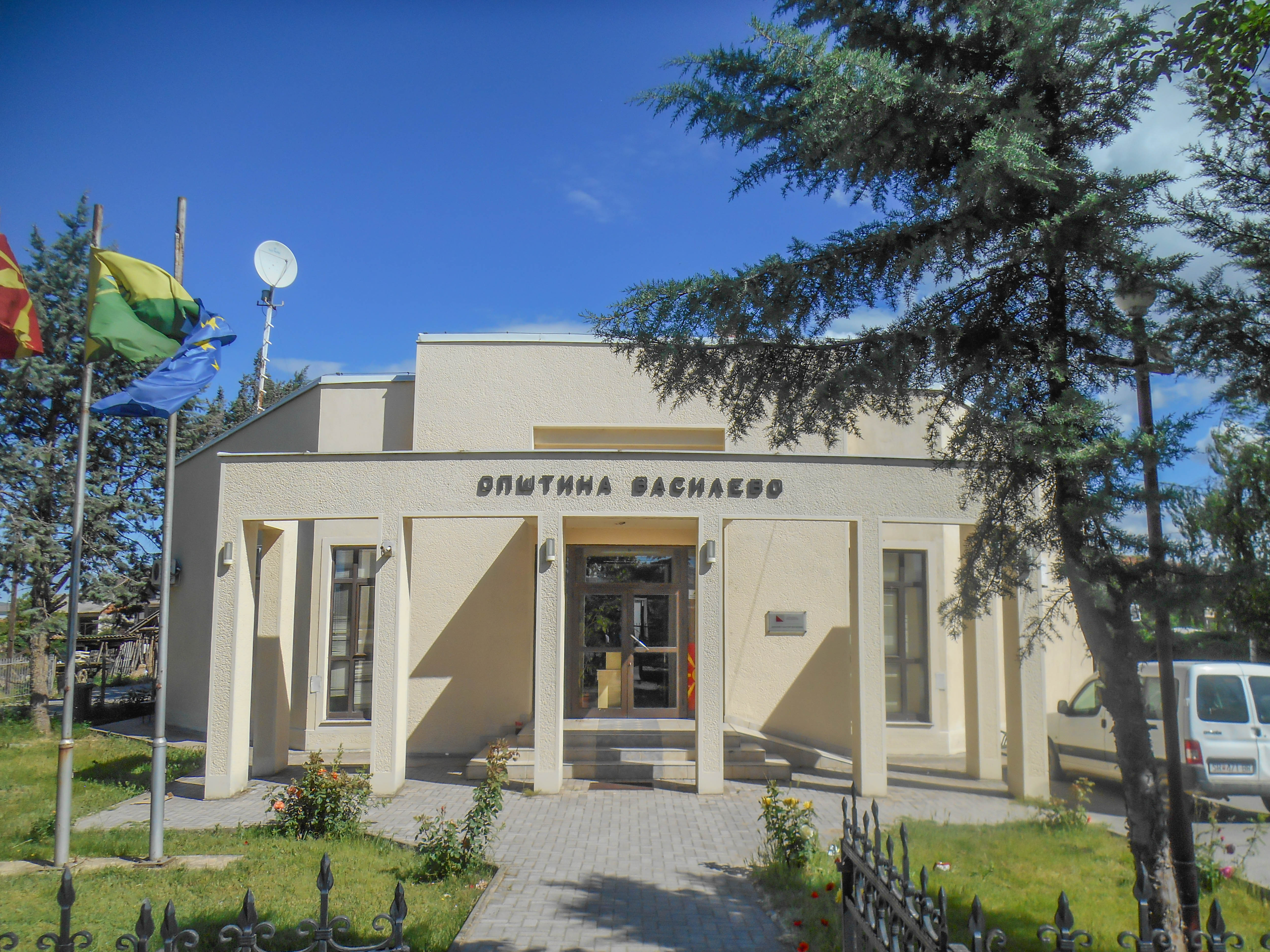 Административна зграда на Општина Василево